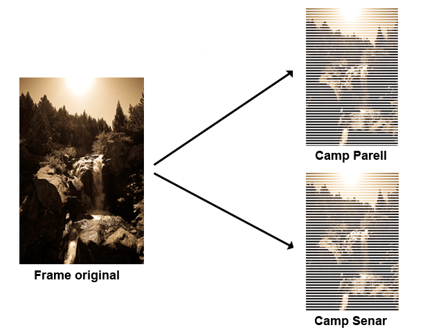 Imatge de separacio d'un fotograma en camp senar i camp parell